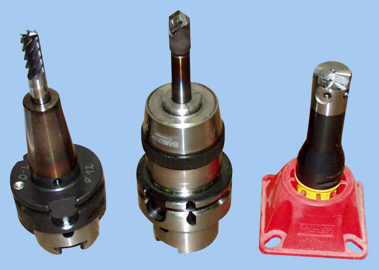 Schrumpfspannfutter mit Hartmetallfräser, Spannzange mit Fasenfräser, Schaftfräser mit Hartmetalleinsatz